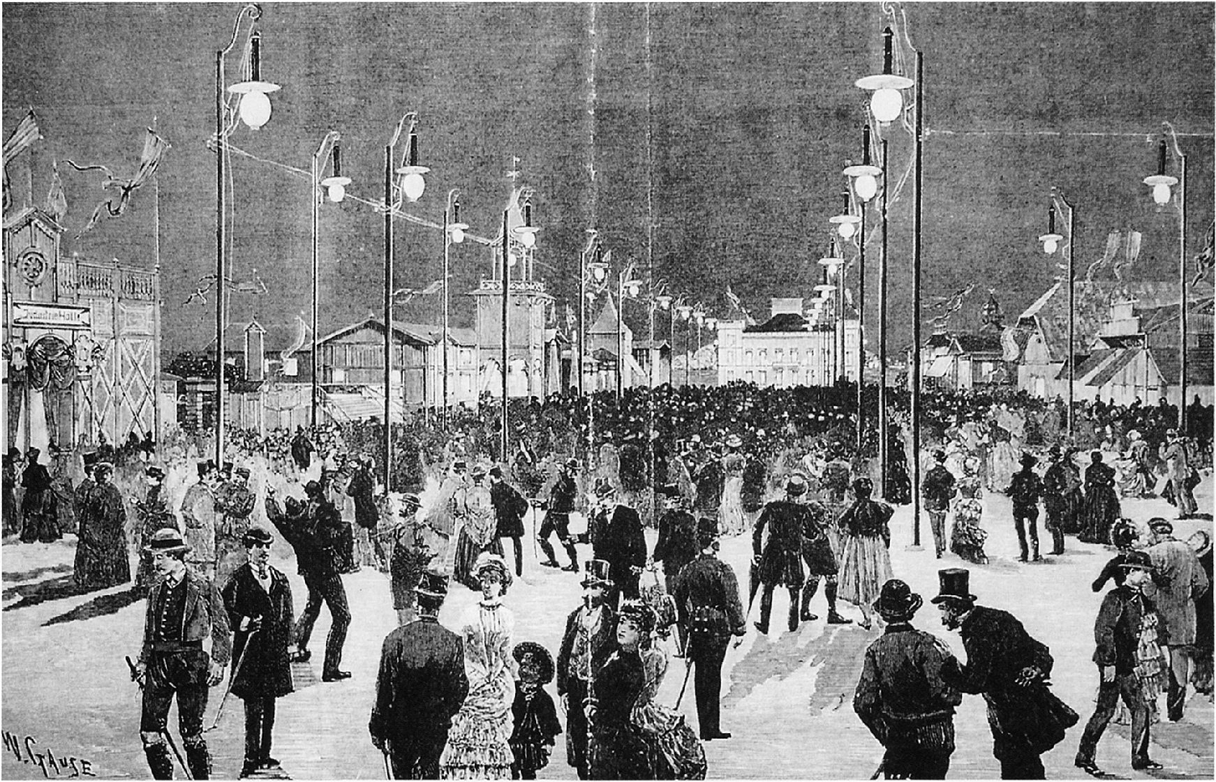 Der beleuchtete Festplatz der Electrischen Landes - Industrie - Forst und culturhistorischen Ausstellung in Steyr 1884.